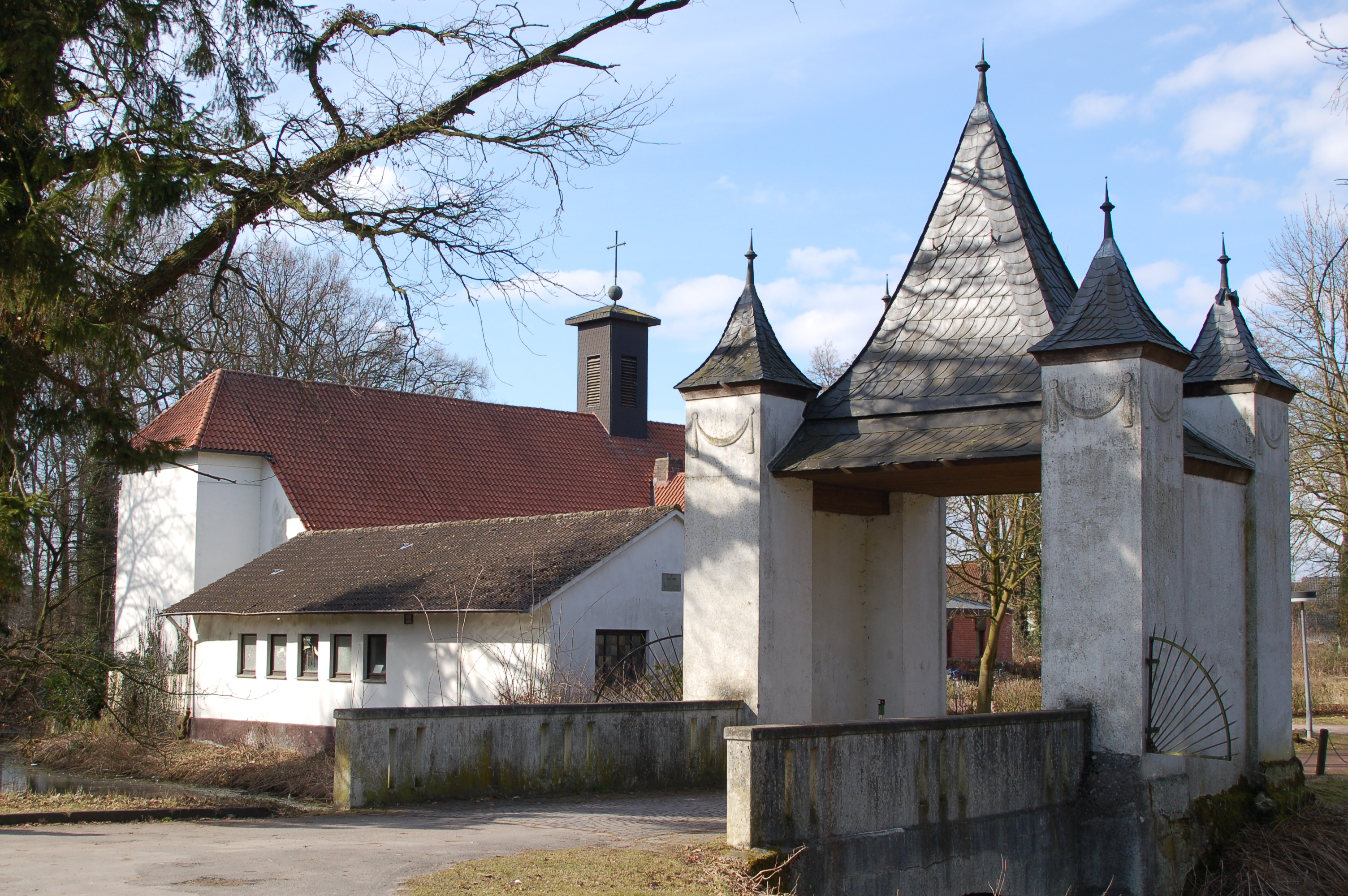 Die evangelische Kirche in Nordwalde